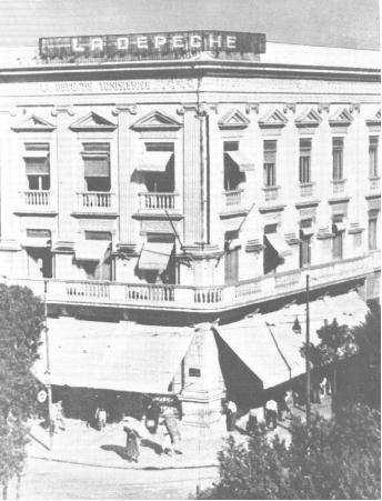 L'immeuble de "La Dépêche Tunisienne", Tunis, Tunisie